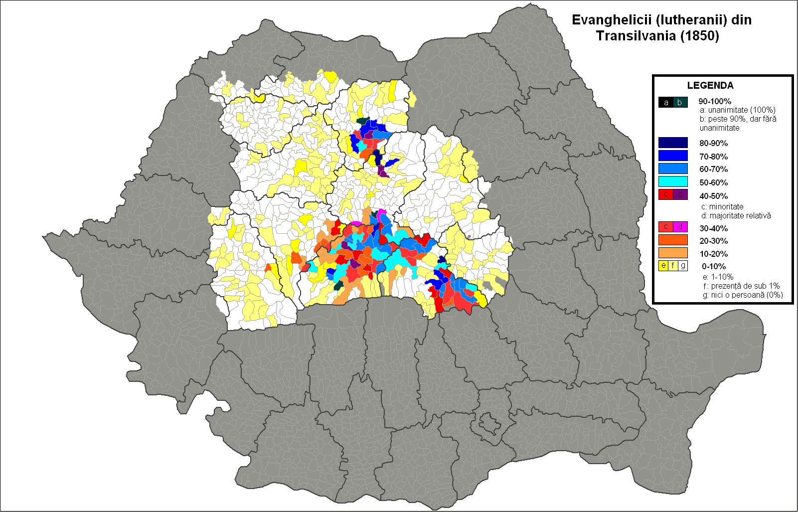 Evanghelicii (lutheranii) din Principatul Transilvaniei (1850).